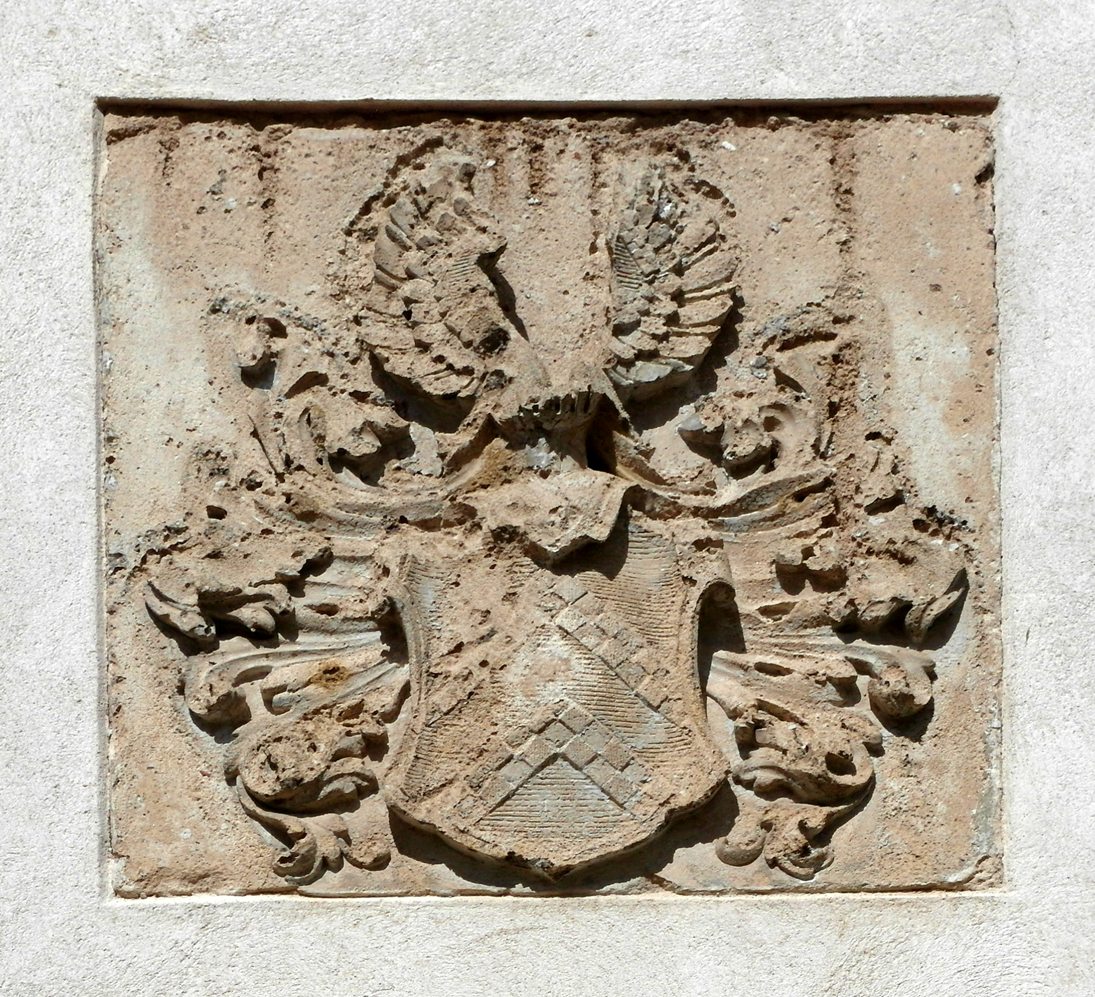 06.04.2017 02681 Crostau, Am Park 4 (GMP: 51.083319,14.453167): Renaissanceschloß, erbaut unter Rudolf von Rechenberg, 2. Hälfte 16. Jh., 1860 im Stil der deutschen Renaissance umgebaut. Wappen der Grafen Schall zu Bell rechts vom Eingang [SAM9278.JPG]20170406415DR.JPG(c)Blobelt